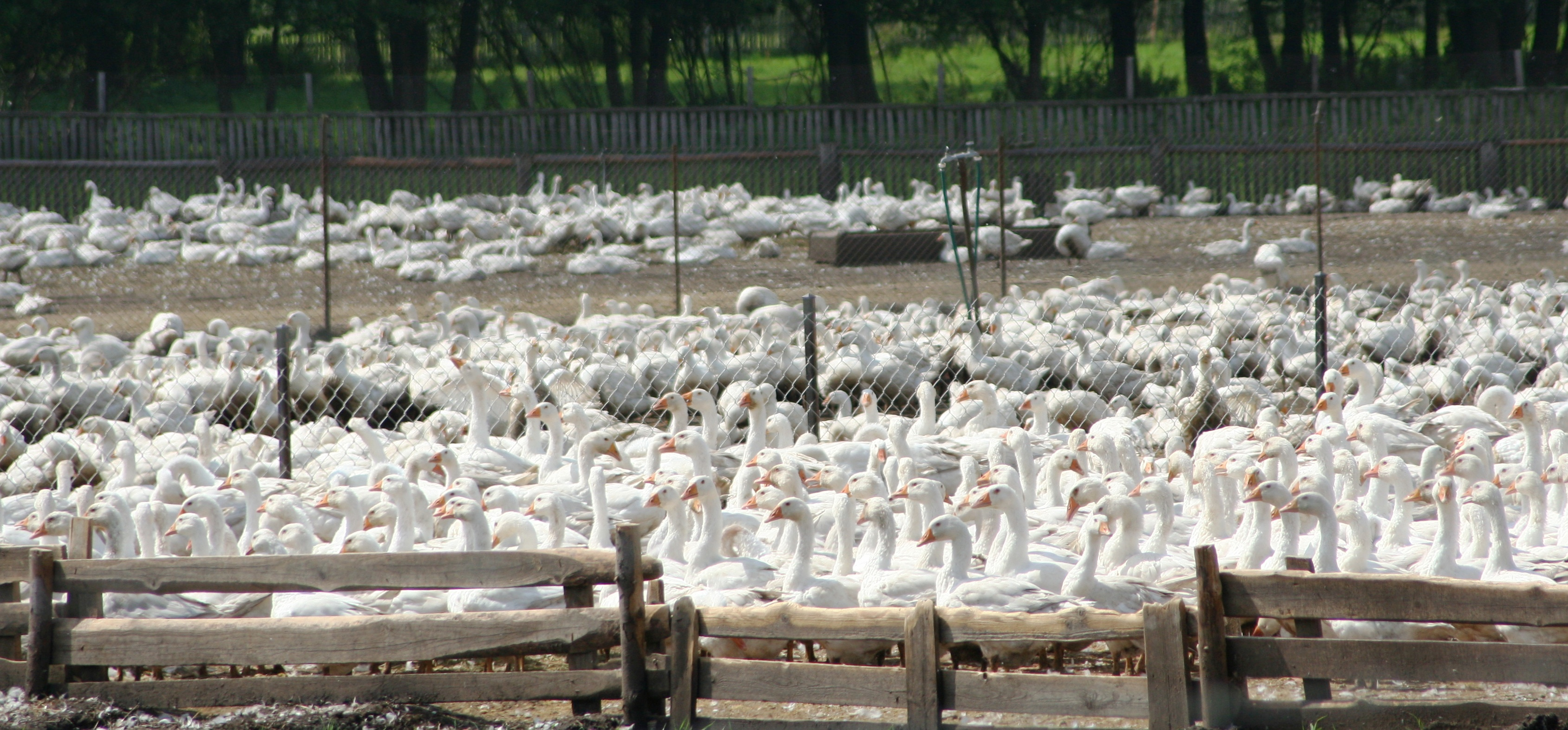 Ferma gęsi w miejscowości Odrynki, gmina Narew, woj. podlaskie